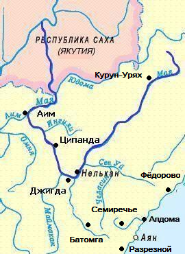 Карта реки Мая